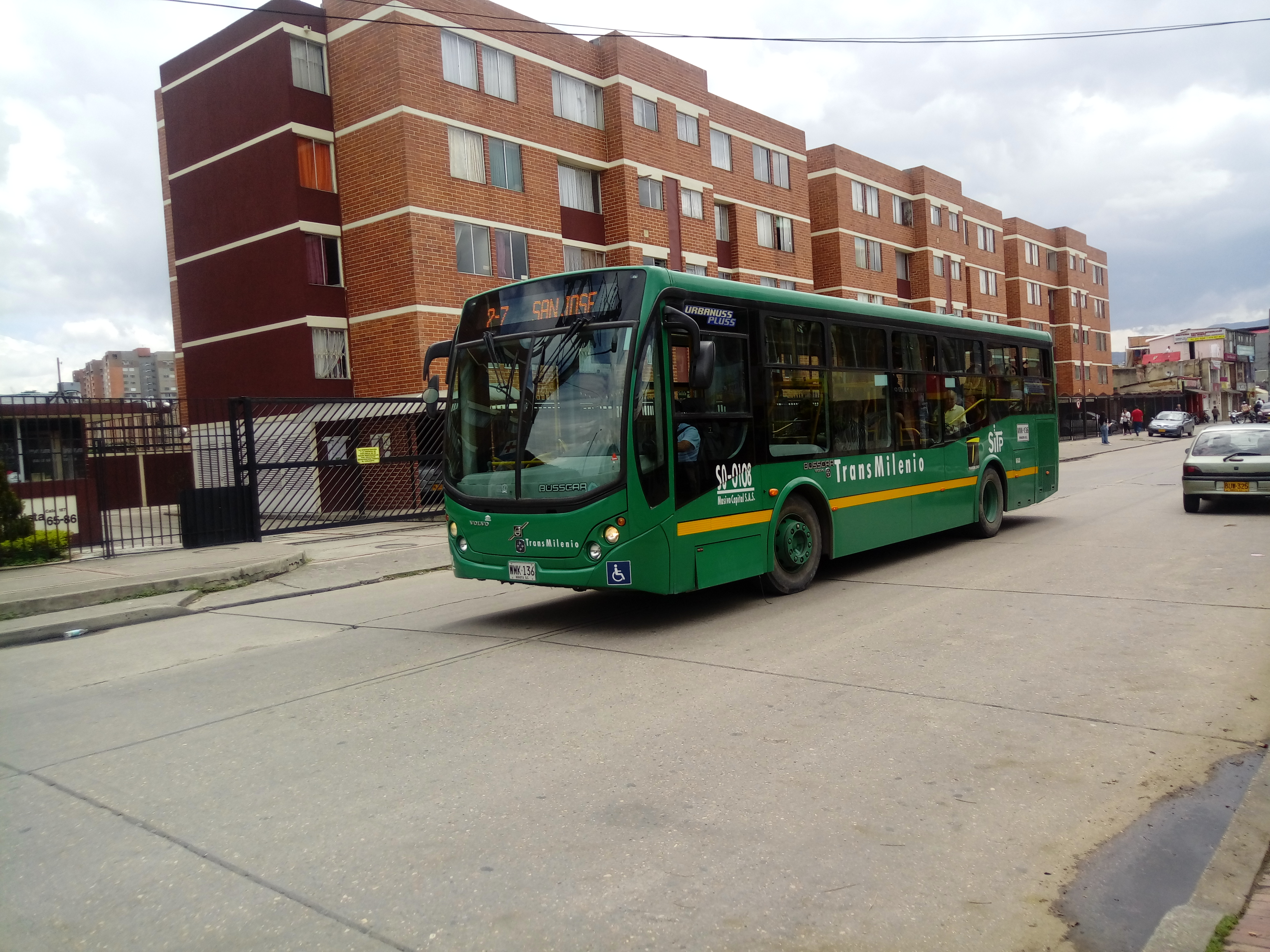 gjfjfkfjgjfjgkfkfkff